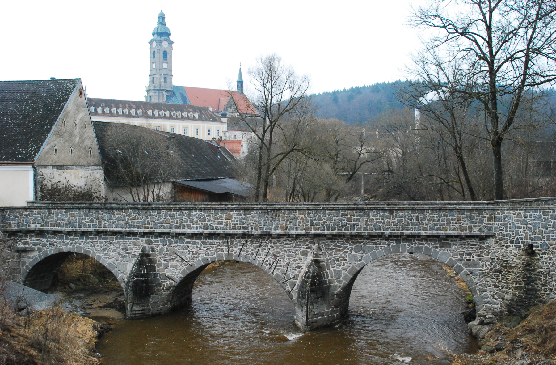 Brücke über den Kamp beim Stift Zwettl in Niederösterreich